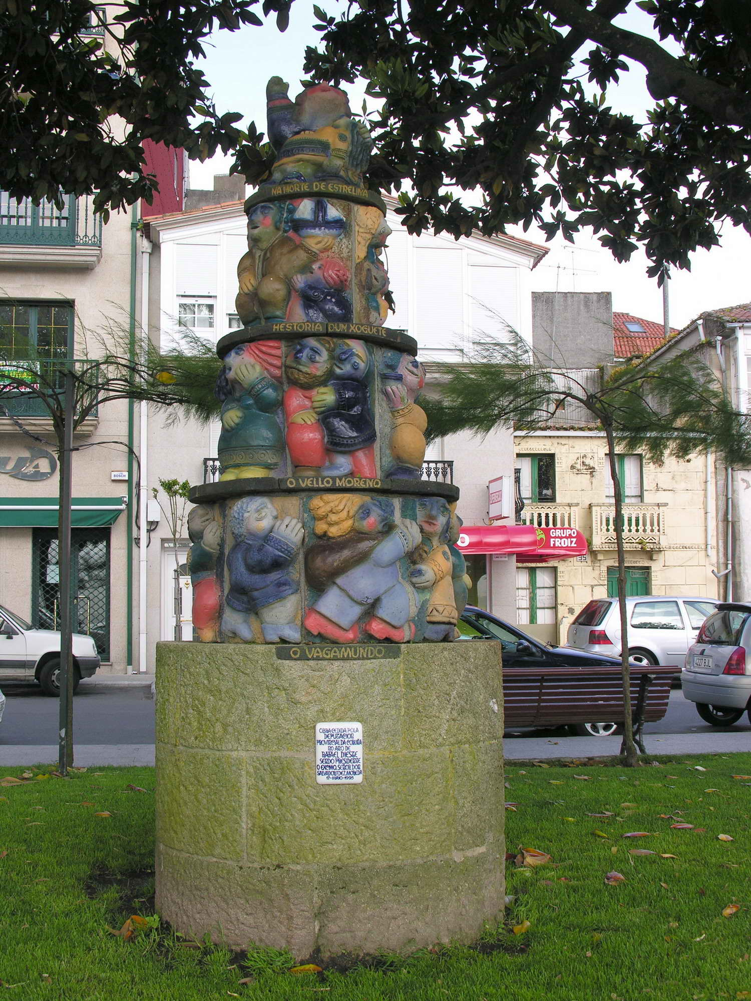 Rianxo, A Coruña, Galicia. Publish by= Luis Miguel Bugallo Sánchez. Self made